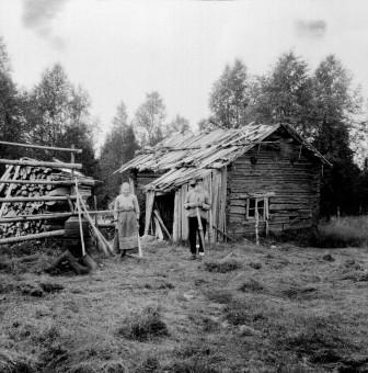 Edla och Erik Eriksson vid rökstugan i Nittberget, Grangärde socken.